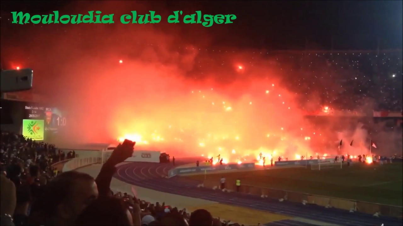 Le derby de feu